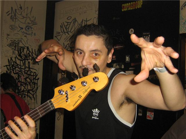 Coulisses